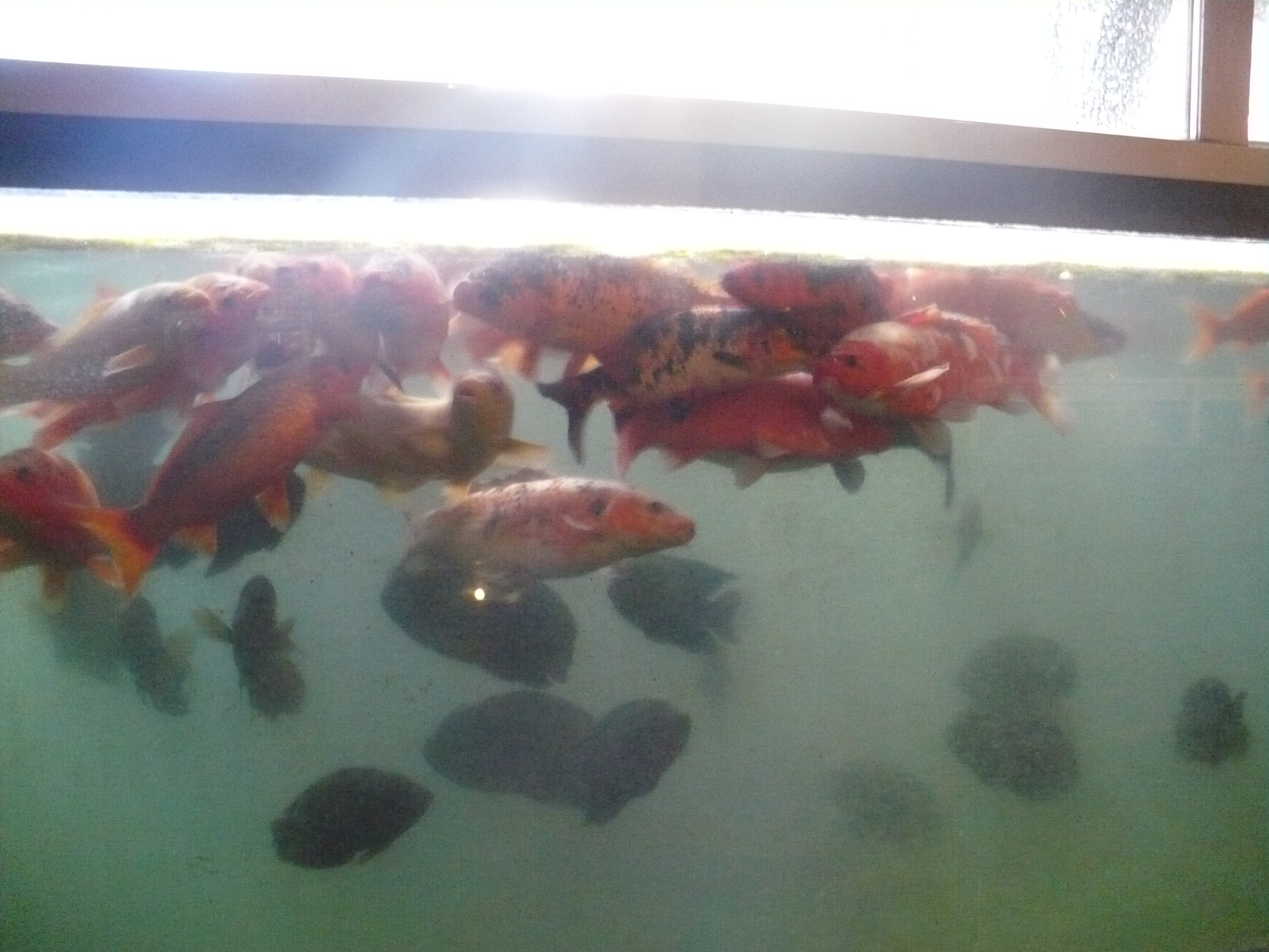 Museo del mar